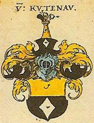 Ritterschaft und Adel in Bayern